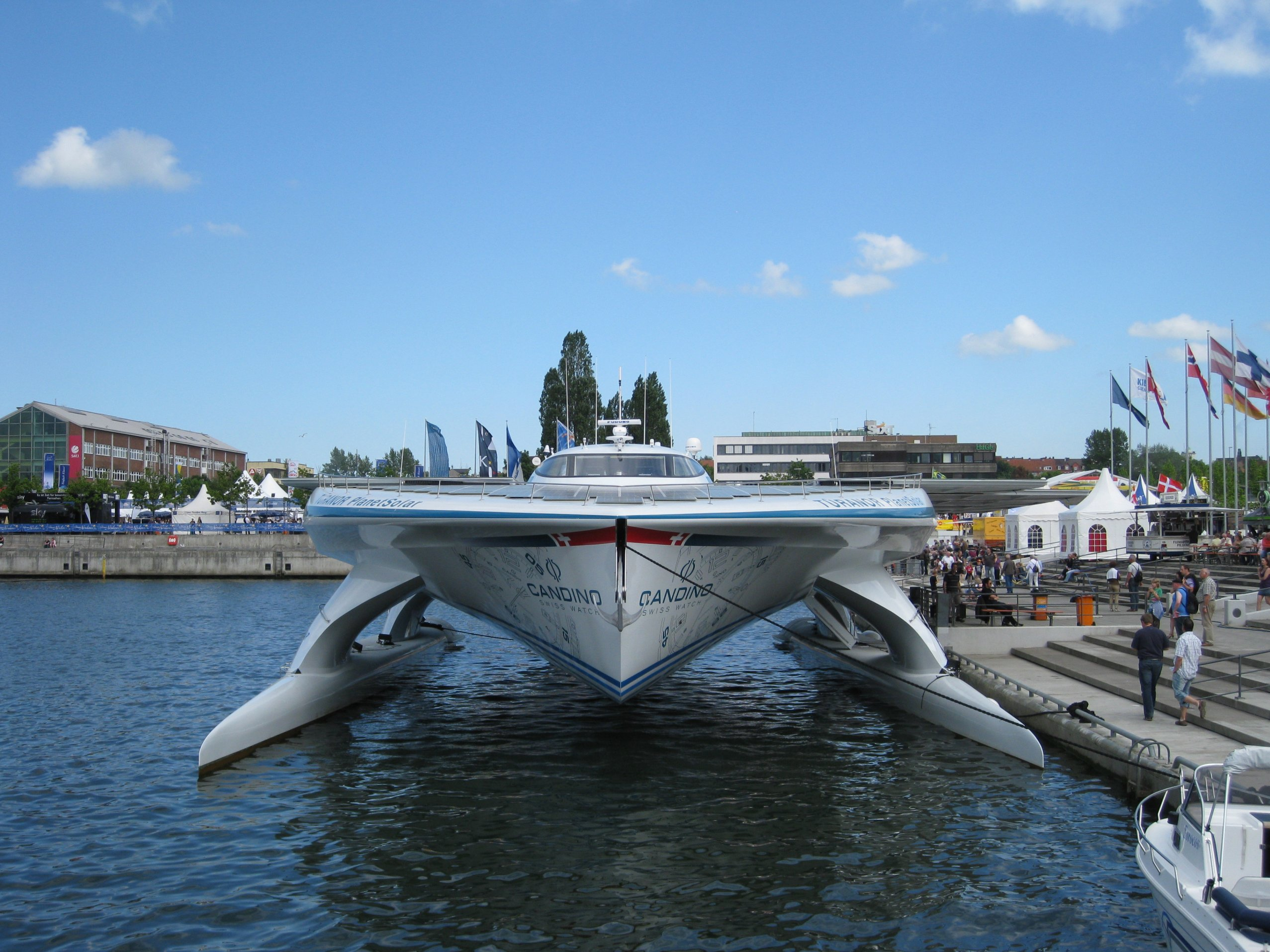 Frontansicht der PlanetSolar in der Hörn, dem Südabschluss des Kieler Hafens.